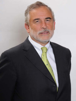 Carlos Montes Cisternas